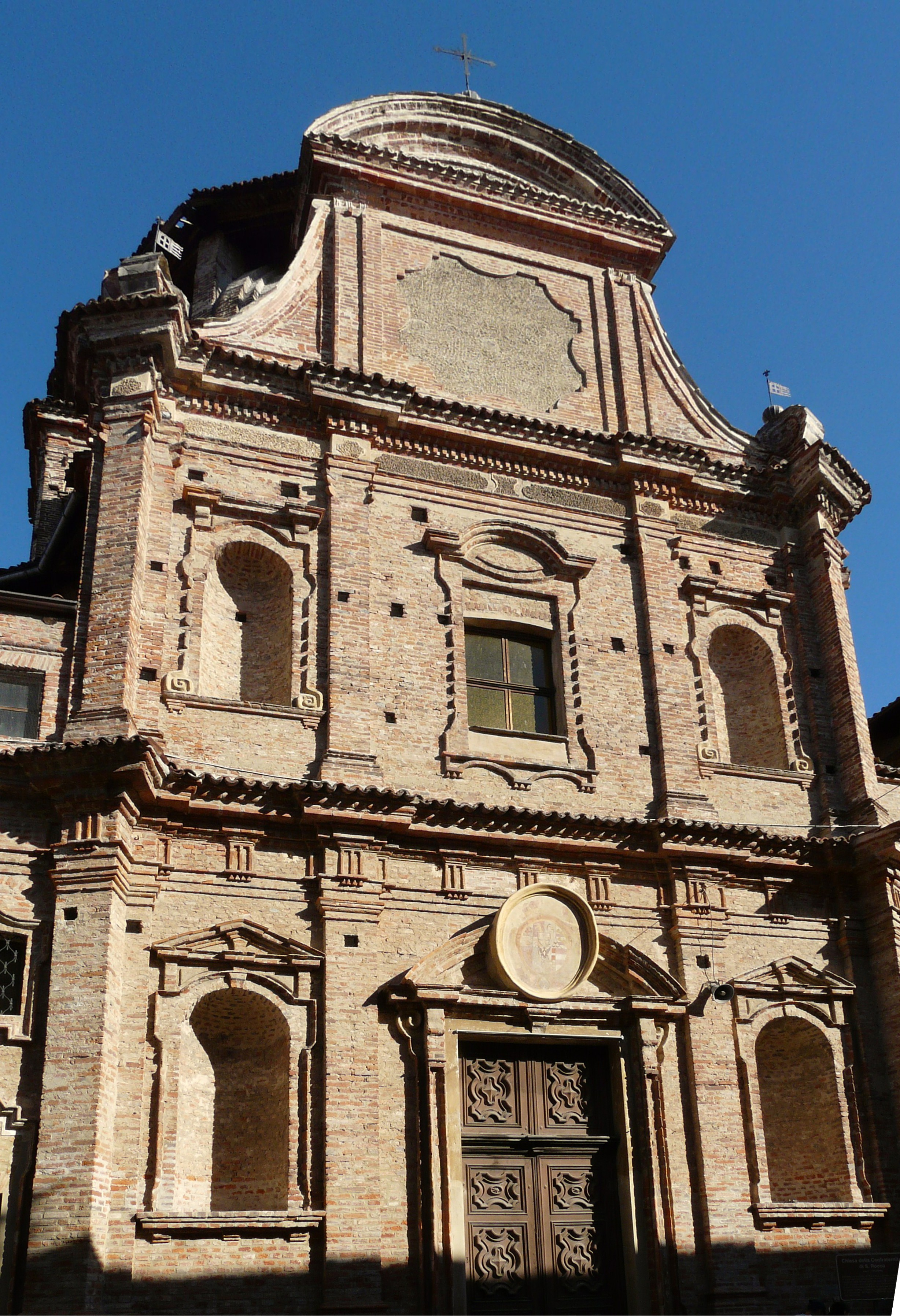 Chiesa della Confraternita di San Rocco, Carmagnola, Piemonte, Italia